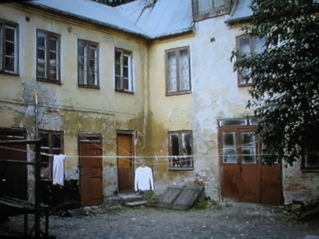 Bakgård i Carolikvarteren, 1968.